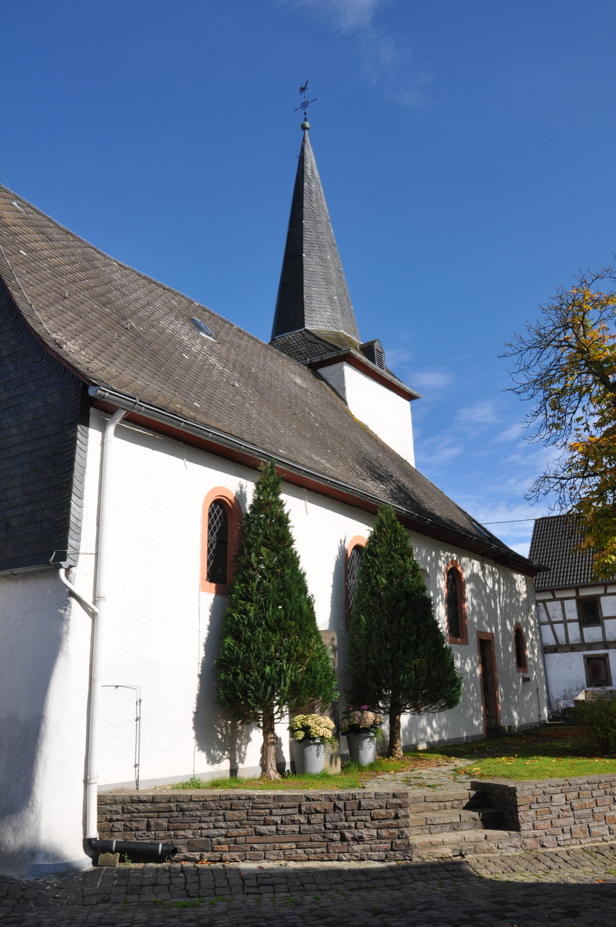 Schmitt, St. Mauritius